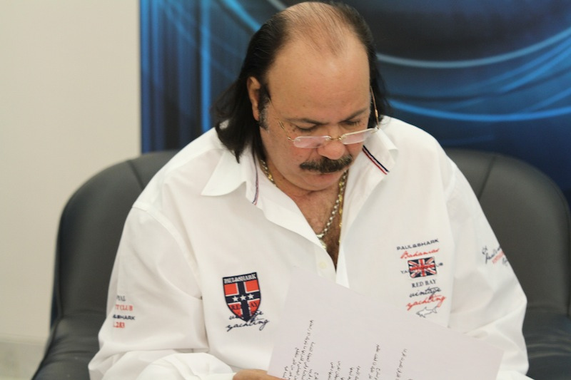 Talaat Zakaria